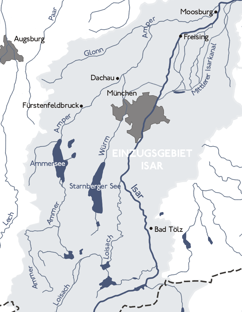 Carte du bassin de l'Amper (Allemagne)